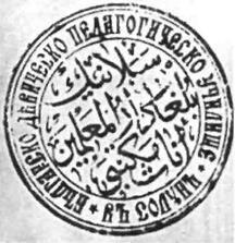 Печат на Солунската българска девическа гимназия.